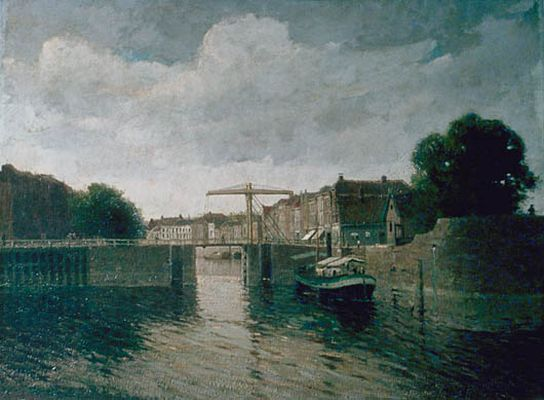 Haven met bastion en Boombrug (1875), door Carel Frederik Cordes.